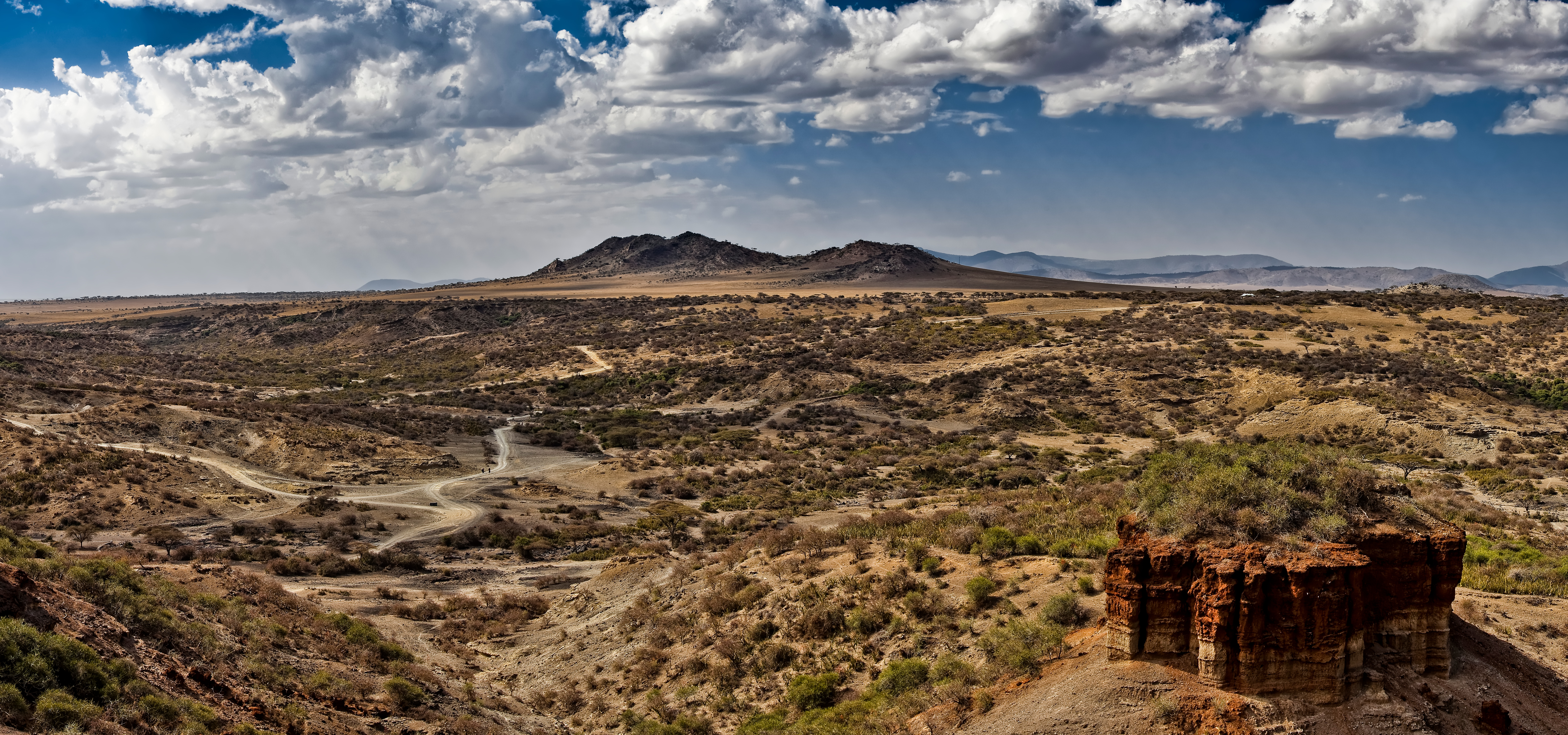 Olduvai Gorge or Oldupai Gorge